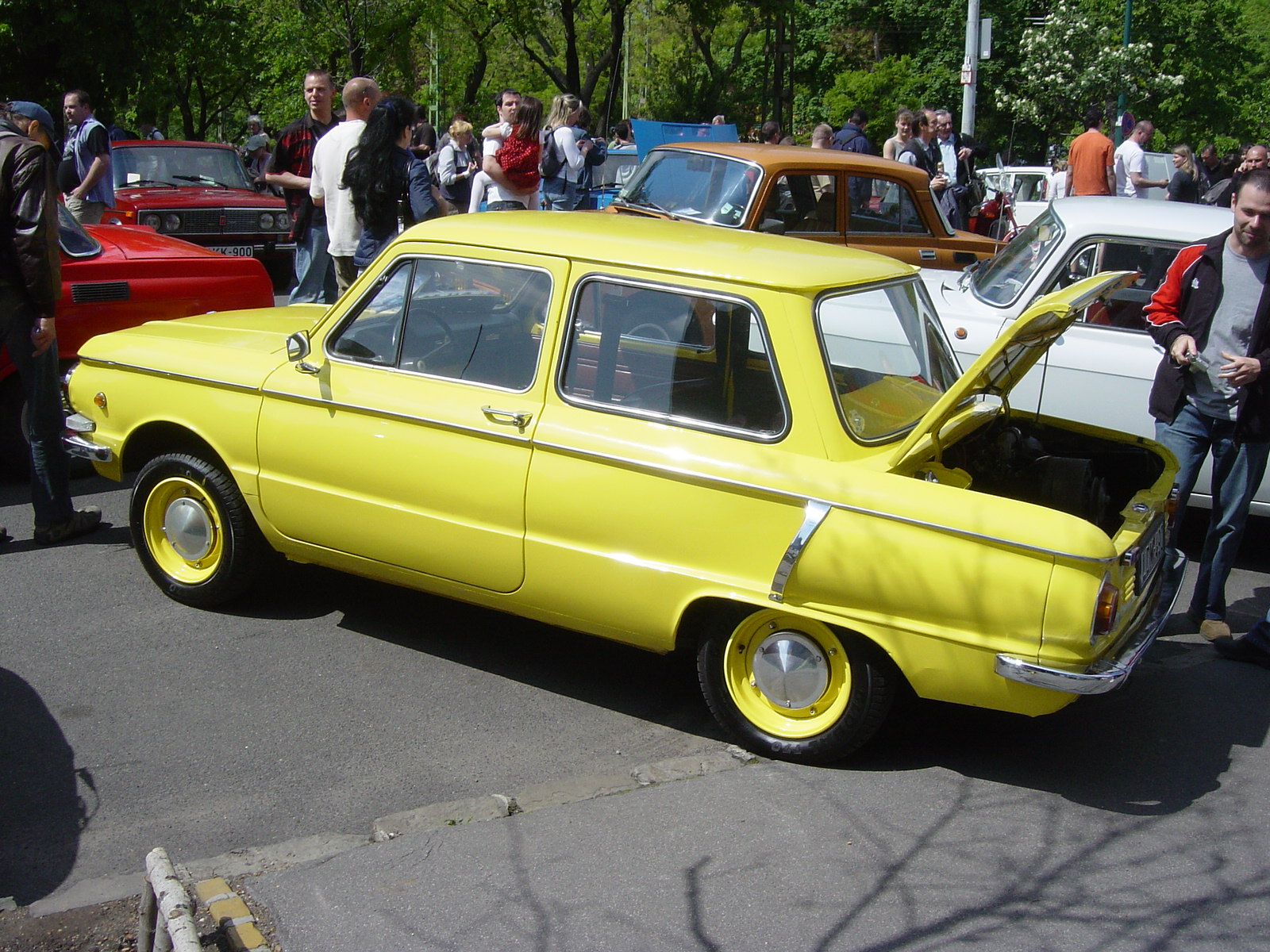 Yellow ZAZ-968 Zaporozhets during Szocialista Jáműipar Gyöngyszemei 2008.